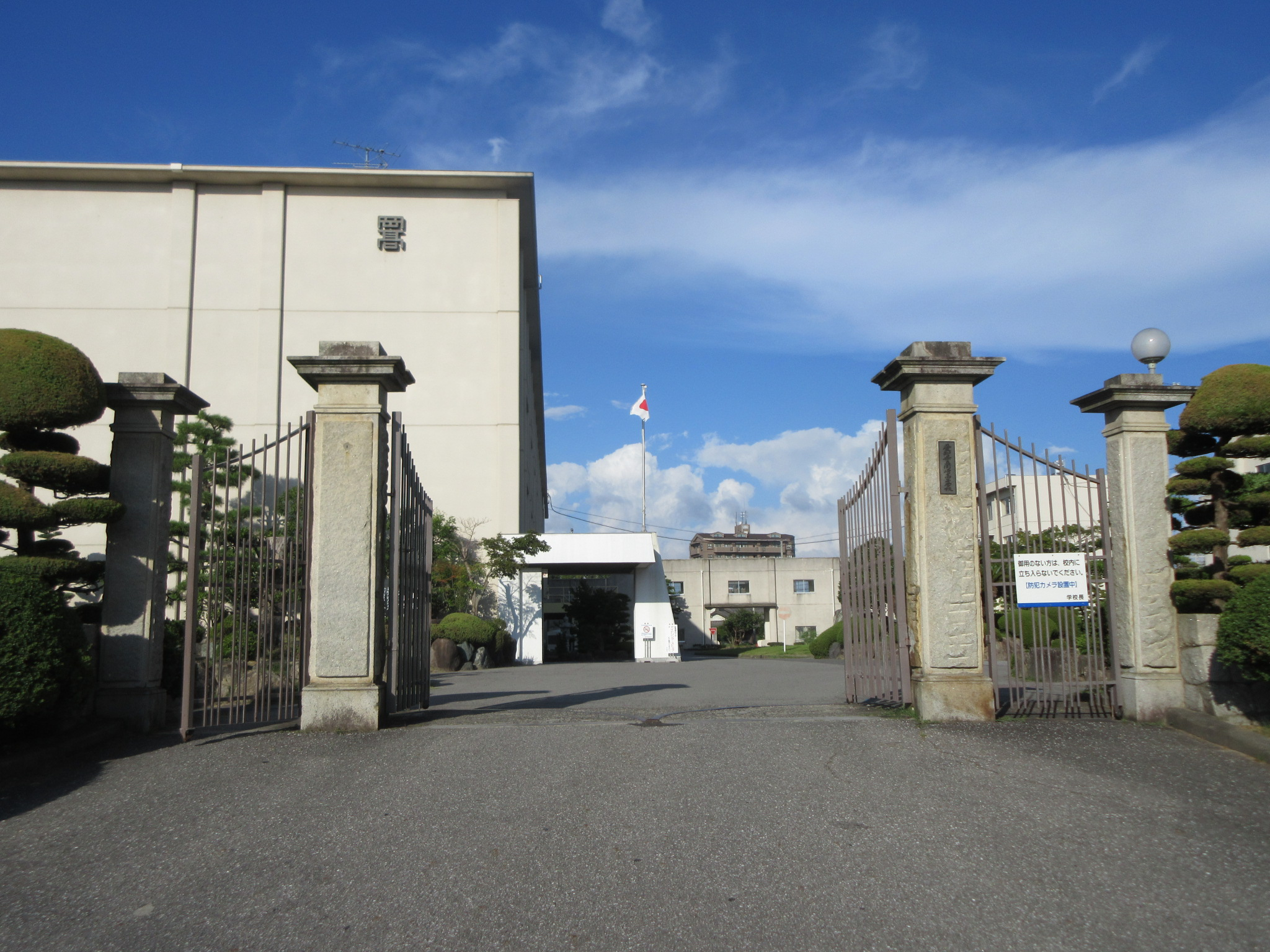 愛知県立岡崎高等学校正門門柱